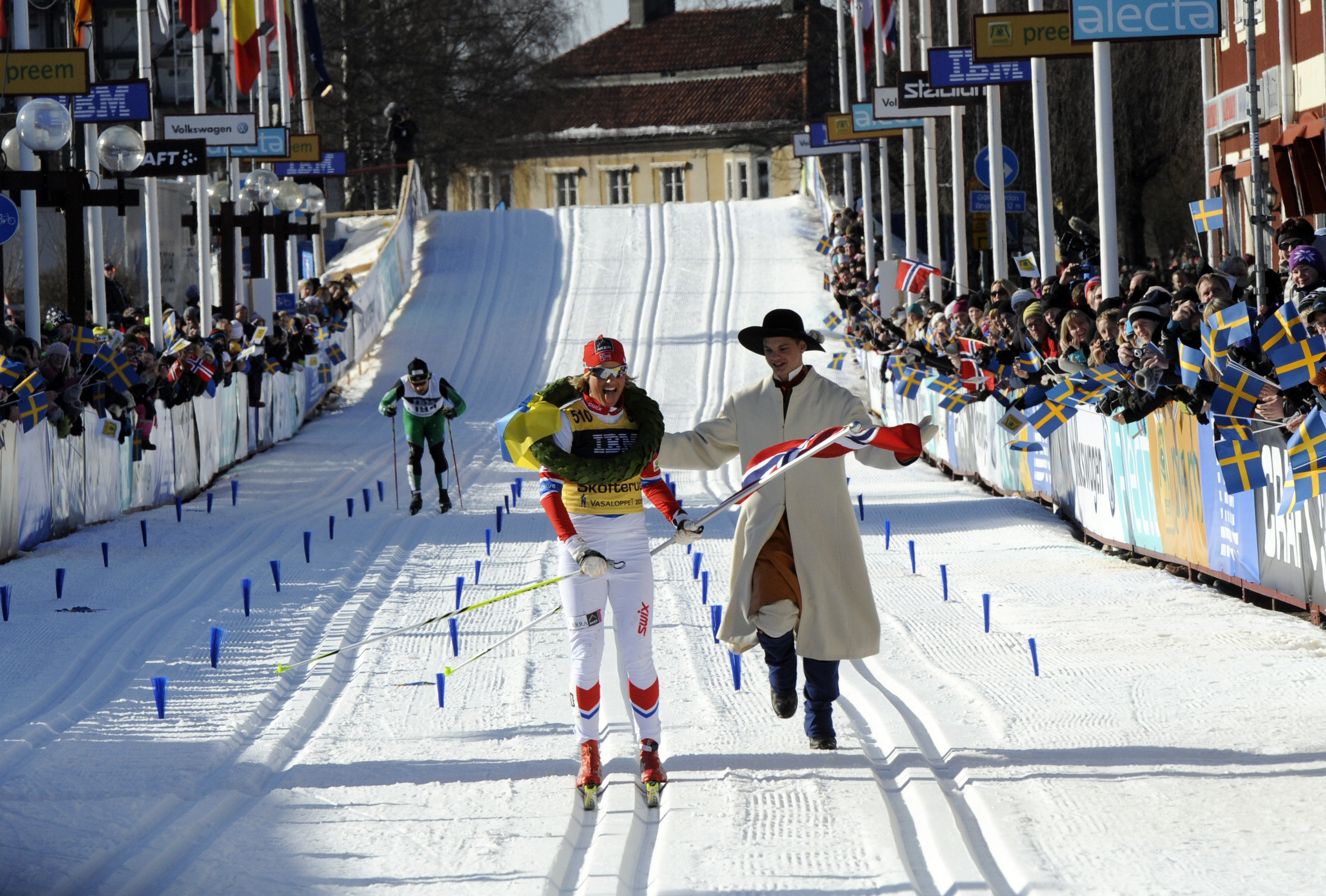 Vibeke Skofterud vinner damklassen i Vasaloppet 2012.